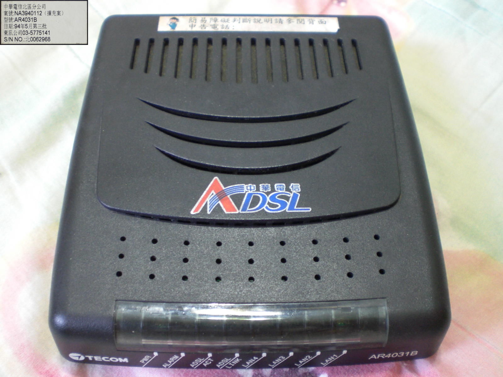 中華電信台灣北區電信分公司東訊ADSL數據機AR4031B，批號2005年5月第三批。